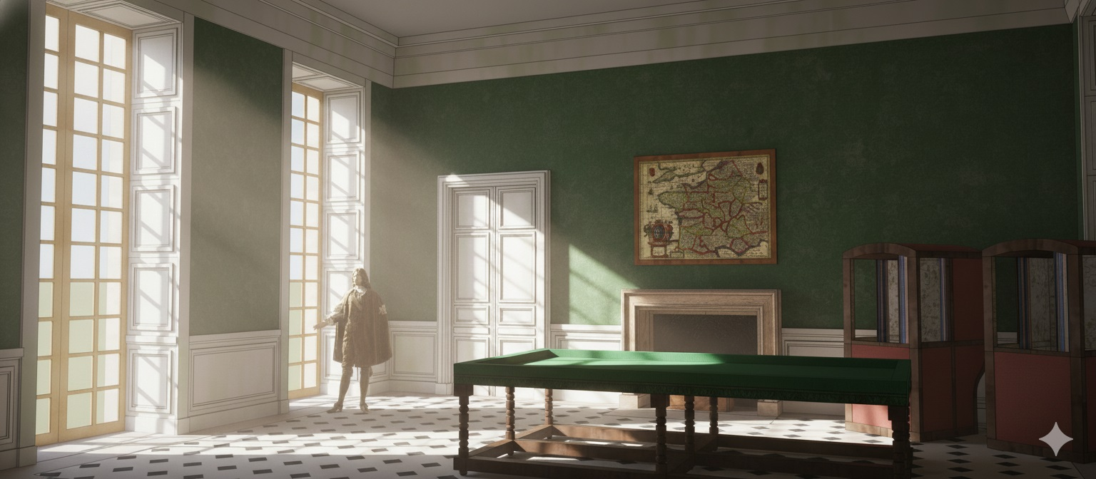 Essai de restitution de l'antichambre de l'appartement d'Abel Servien à Meudon, voisin du Grand Vestibule. Mobilier suivant l'inventaire de 1659.